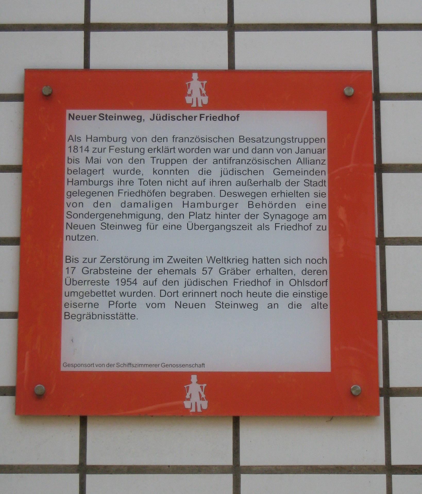 Gedenktafel für den ehemaligen Jüdischen Friedhof im Neuen Steinweg, Hamburg Neustadt, Deutschland / Plaque for the former jewish cemetary in Alter Steinweg, Hamburg-Neustadt, Germany